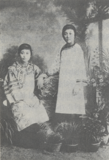 마애방 (윤치호의 두번째 부인, 왼쪽)과 그의 여동생 수진